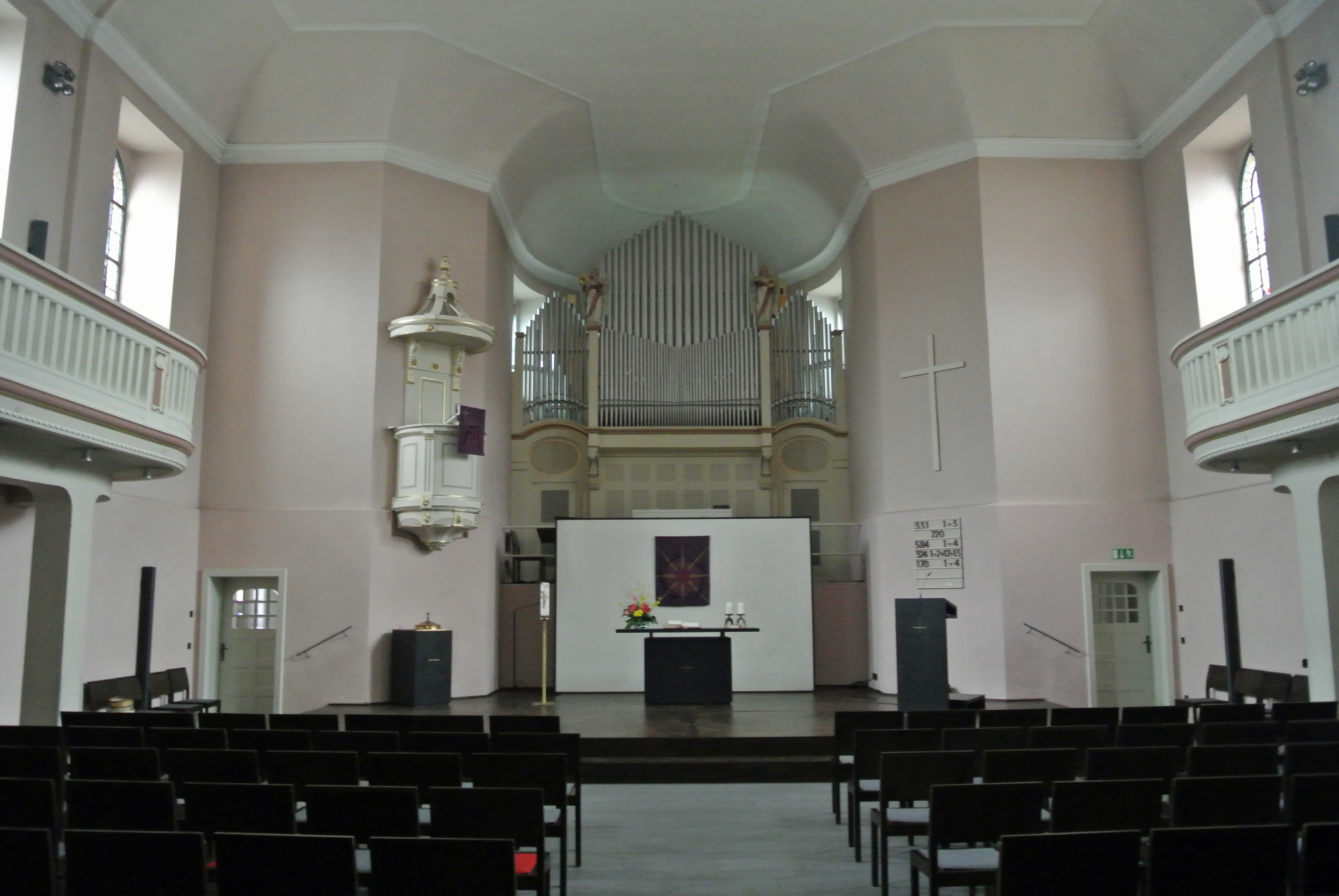 Evangelische Christuskirche in Frankfurt-Nied, als ehemalige Simultankirche 1828 im Stil des Klassizismus errichtet, 1908 'evangelisch' umgestaltet von Ludwig Hoffmann, Altarraum